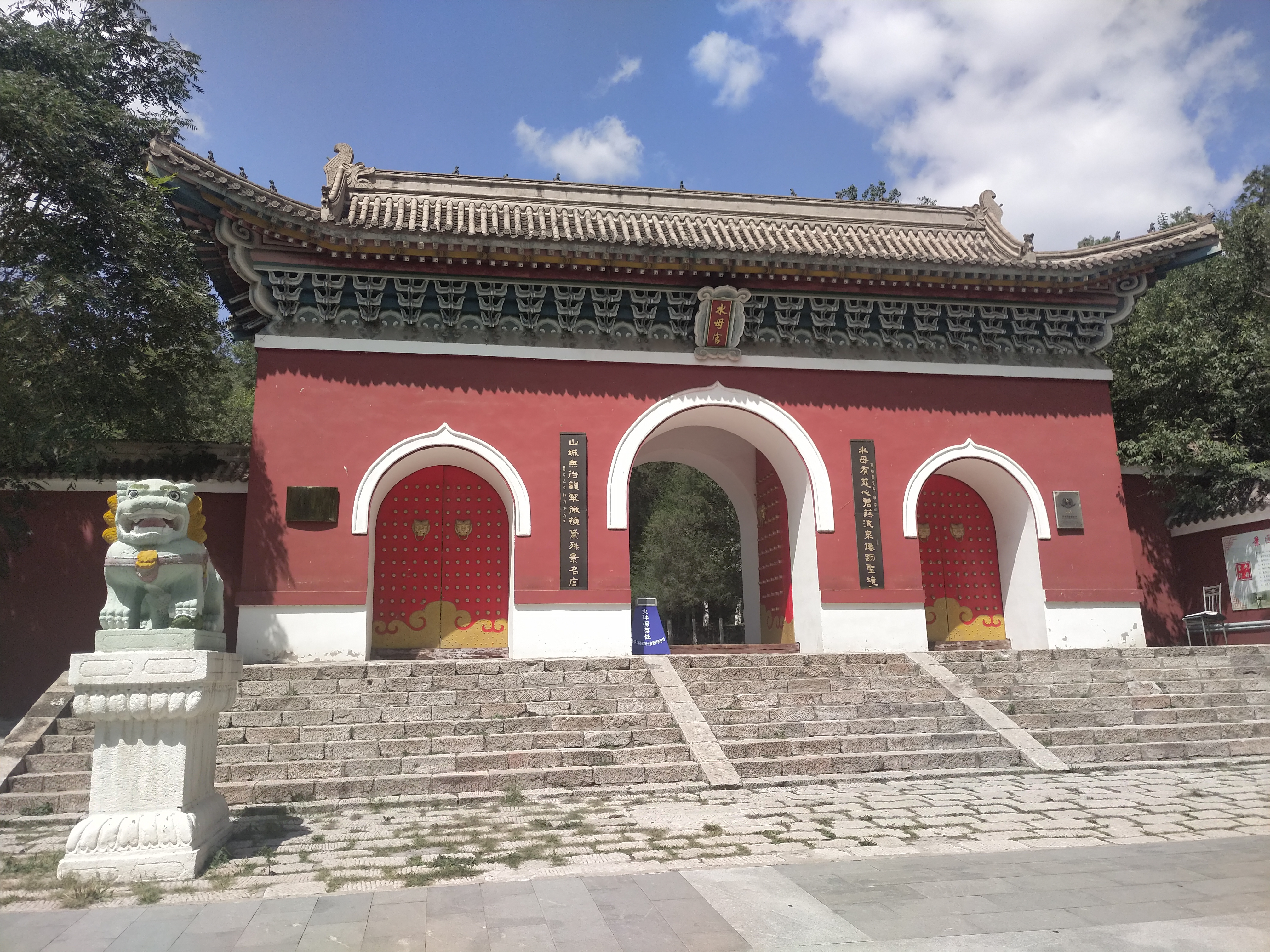 中文（中国大陆）: 河北省张家口市水母宫